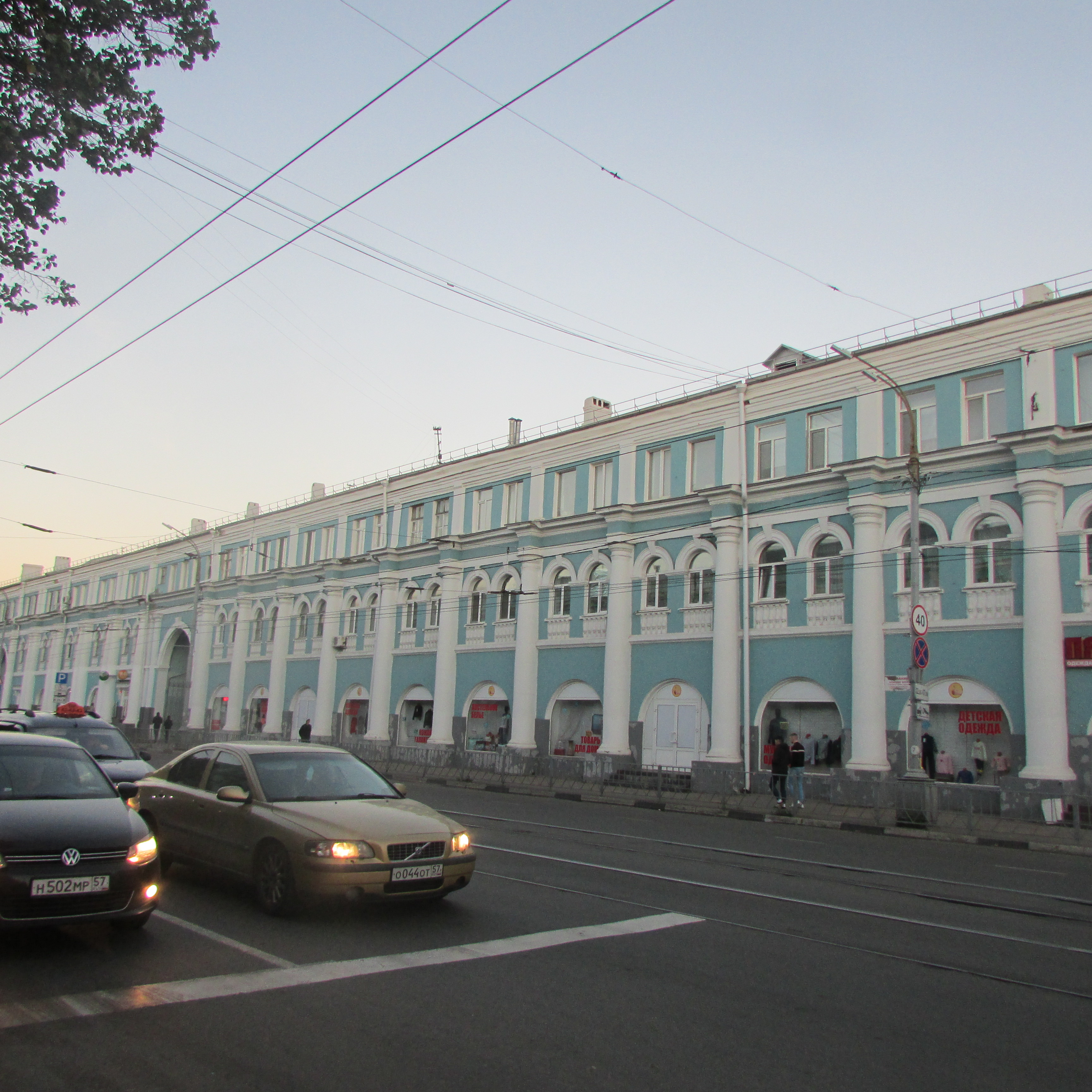 Торговые ряды: улица Московская, 1/3 (Гостиная улица, 3), Орёл.